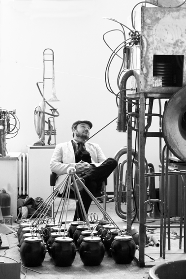 Ralf Sander Studion mit World Saving Machine, Korea.